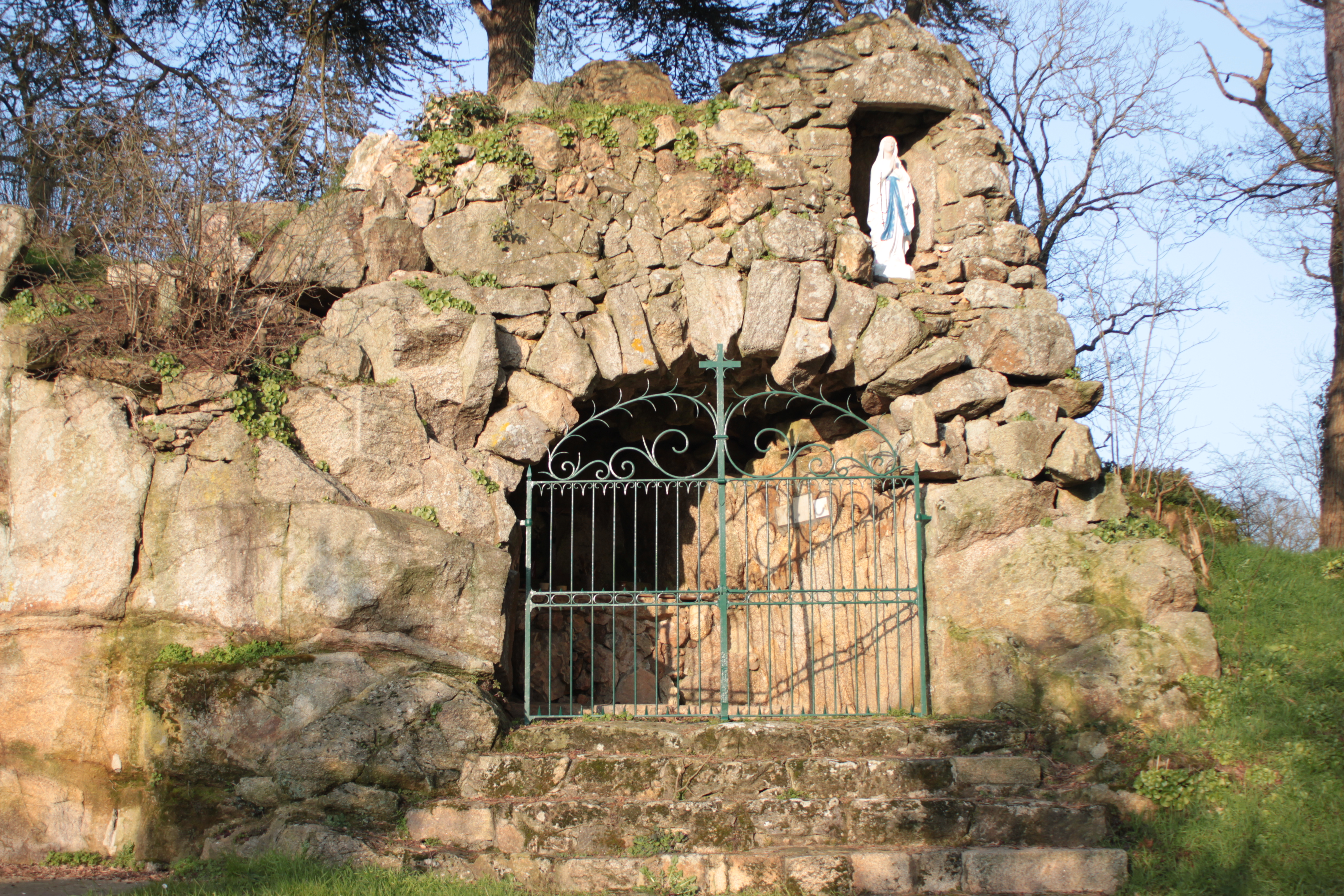 Réplique de la grotte de Lourdes, le Meslay, Fr-85-La Guyonnière.